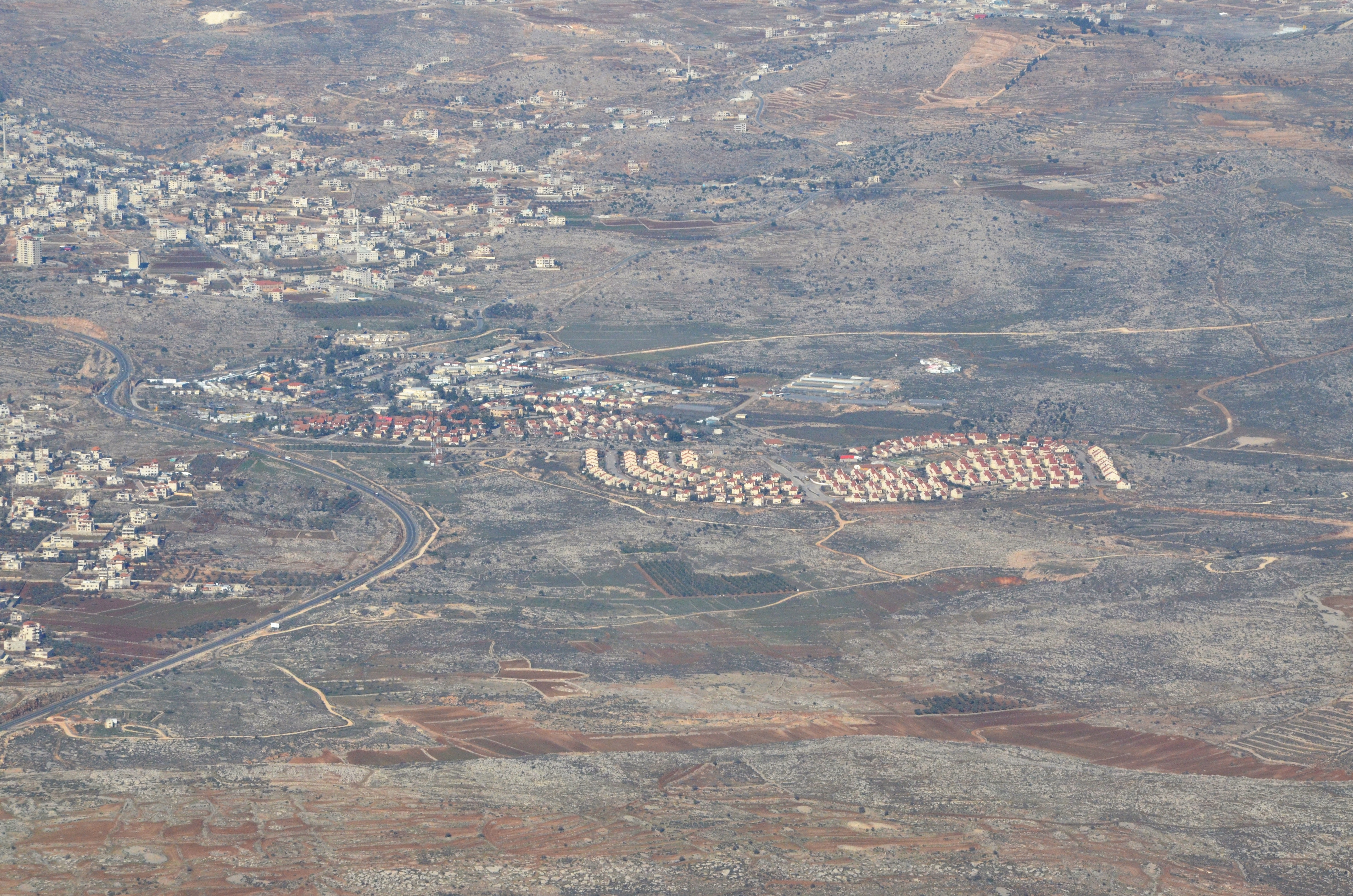 הישוב עפרה בחבל בנימין